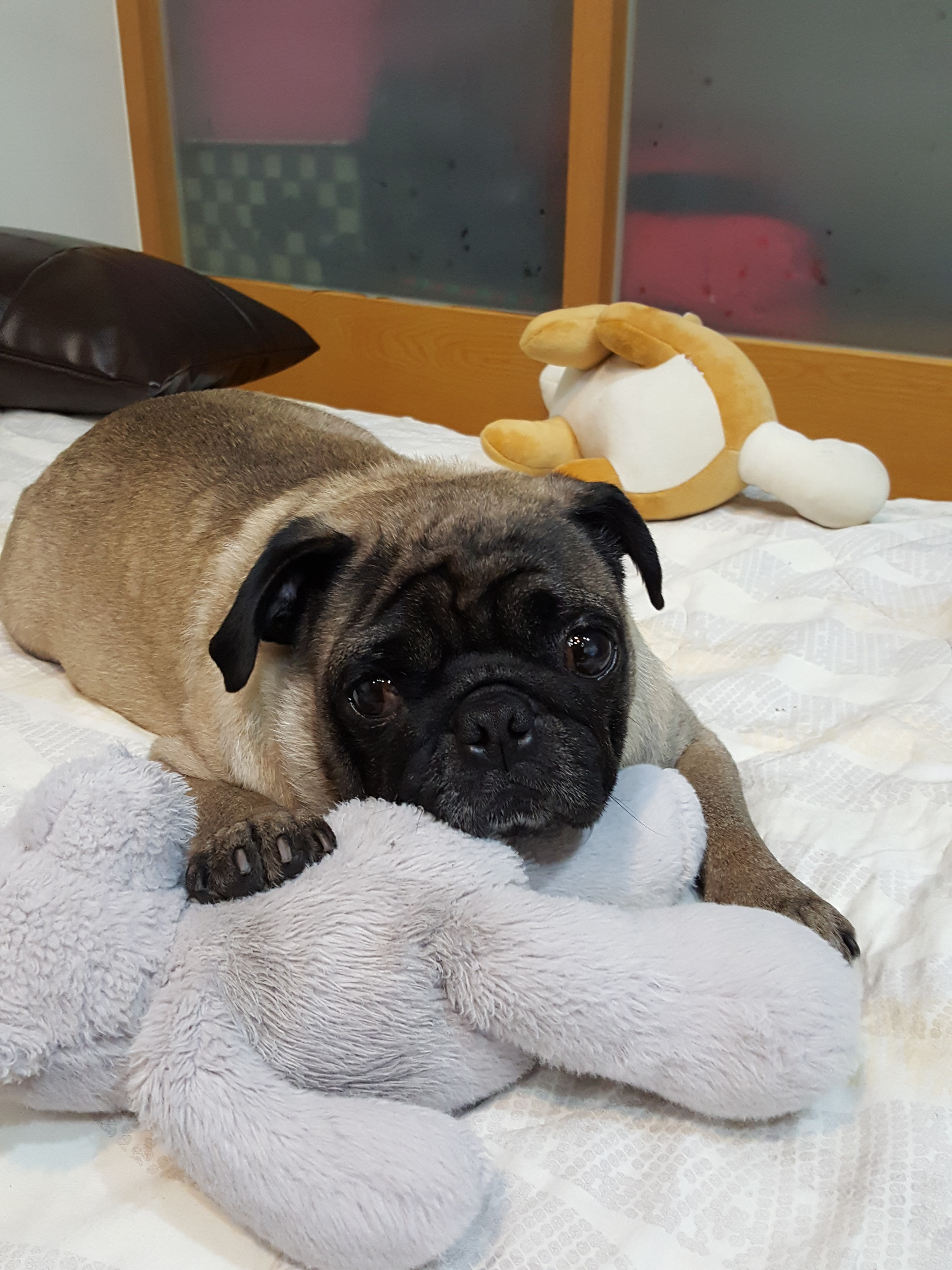 巴哥犬是相當可愛的一種犬種，需要細心與愛心對待。